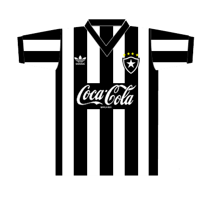 camisa do botafogo 1987